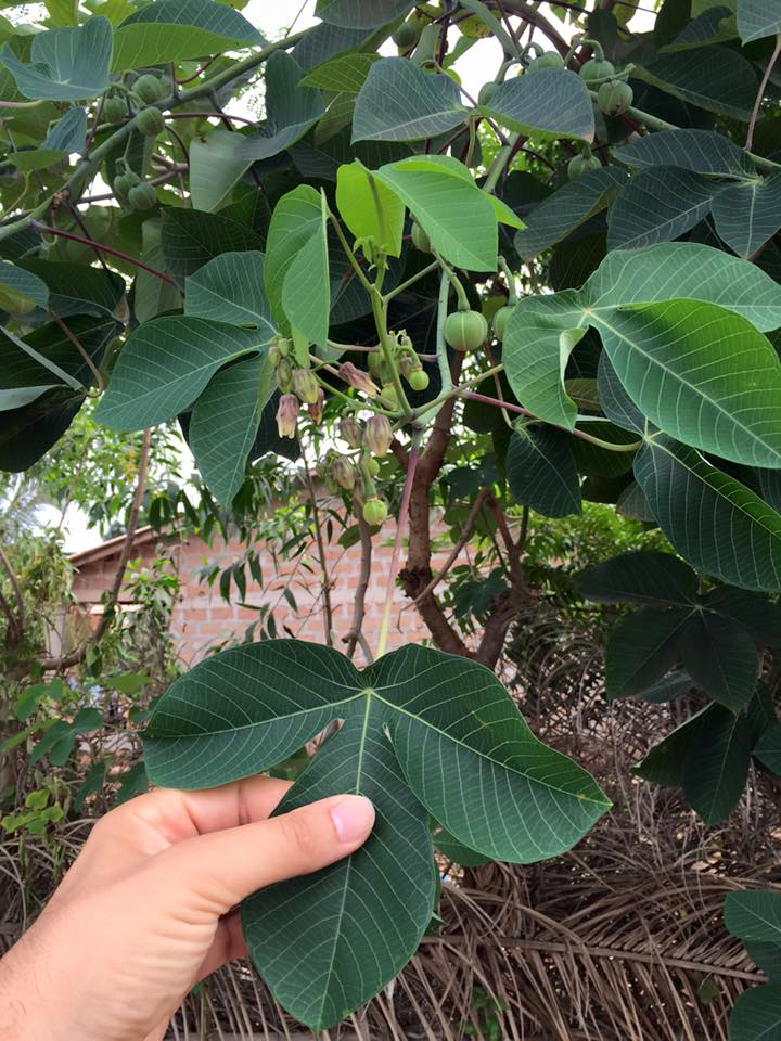 Manihot glaziovii à Cotonou - Bénin